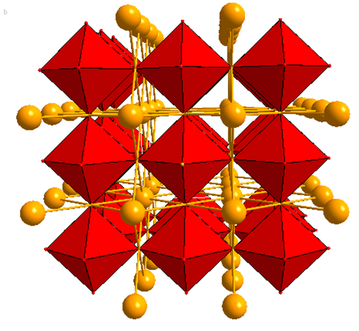 Македонит е минерал на олово титанат што за рв пат бил откриен во 70тите години во СР Македонија. Името го примил по местото на наоѓање. На фигурата со црвени октахедри се прикажани групите {TiO6} а со жолта боја се прикажани центрите на оловото.